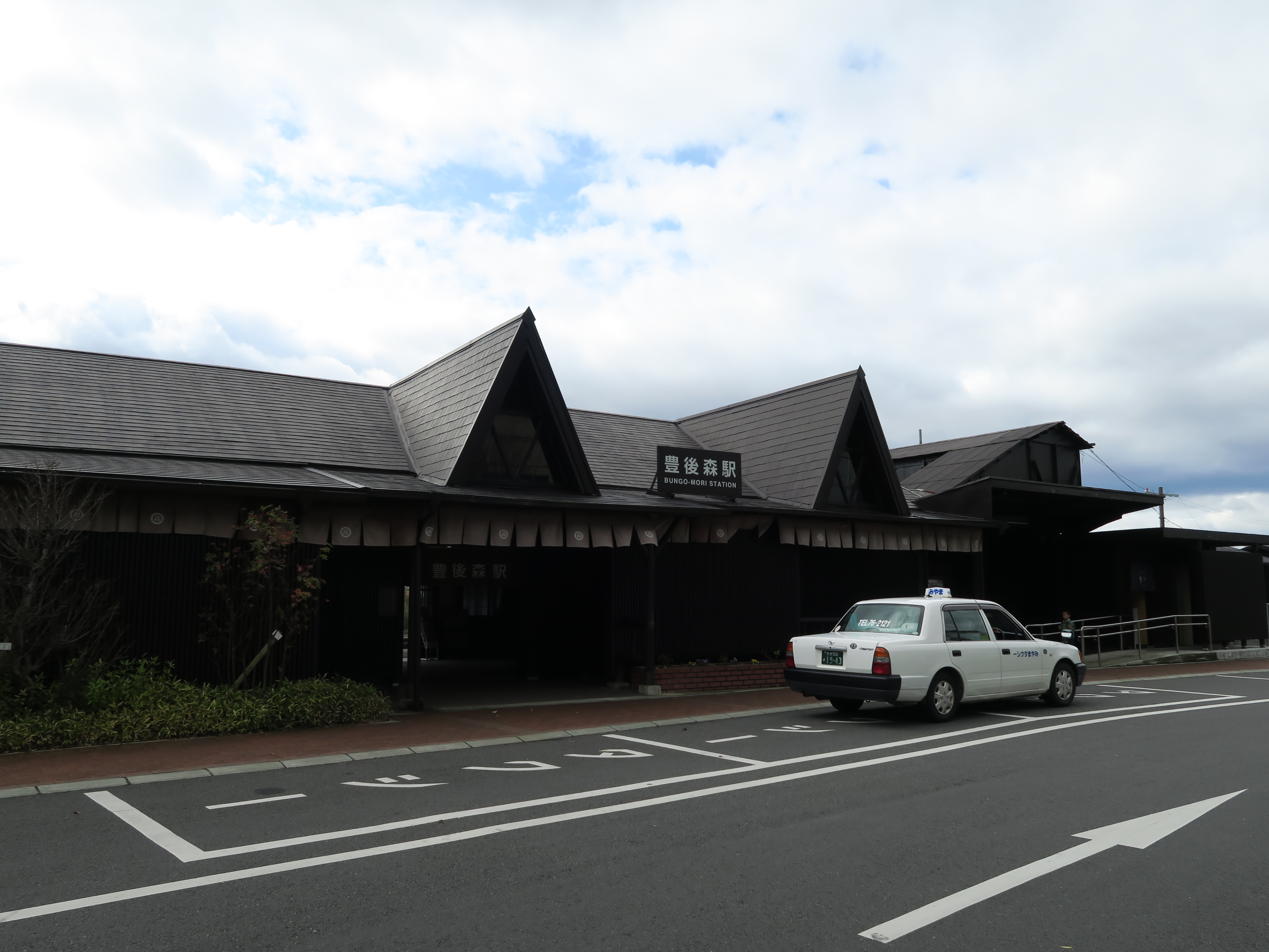 大分県玖珠郡玖珠町 豊後森駅駅舎(リニューアル後)